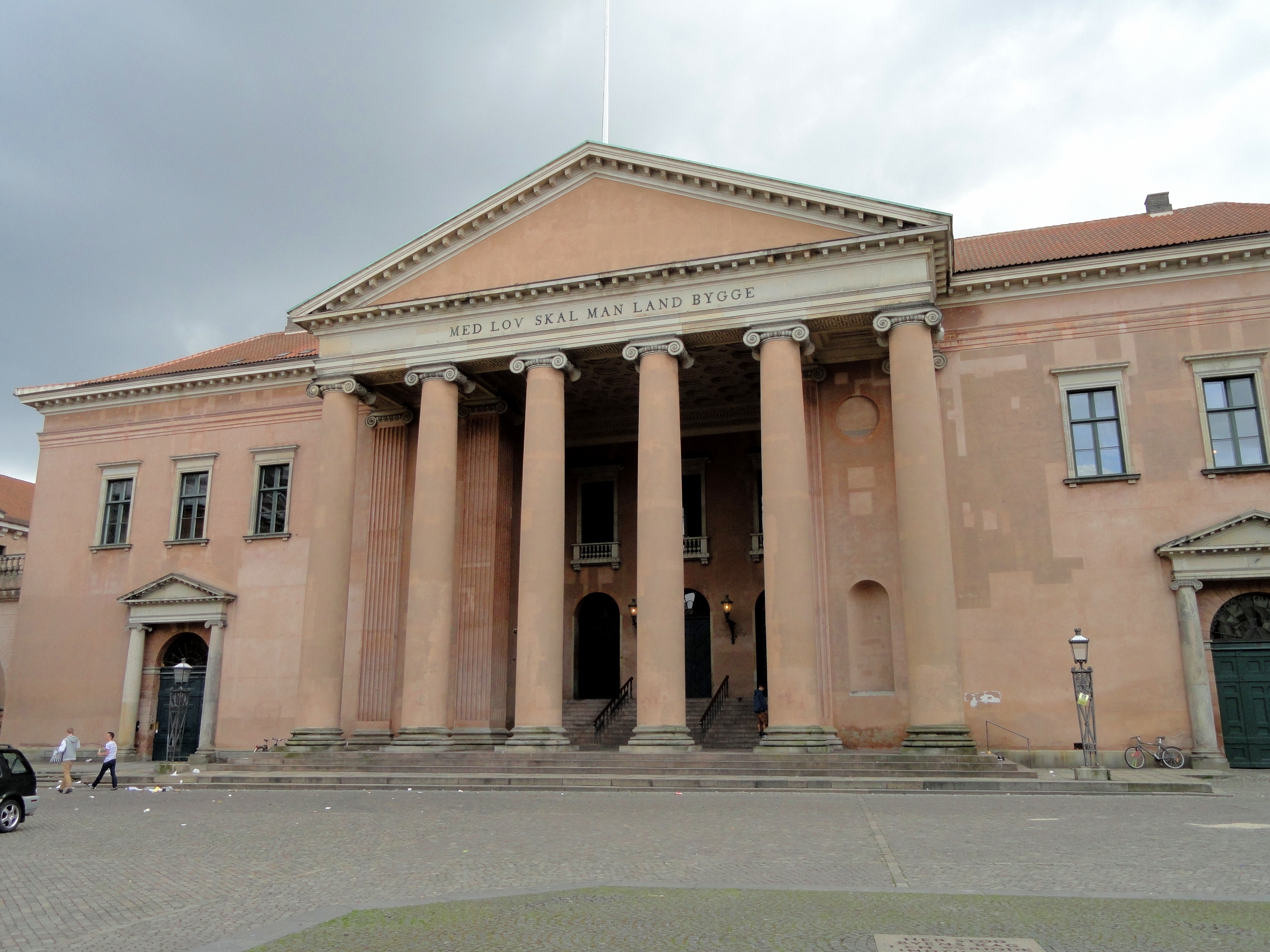 Københavns Domhus, Copenhagen, Denmark.